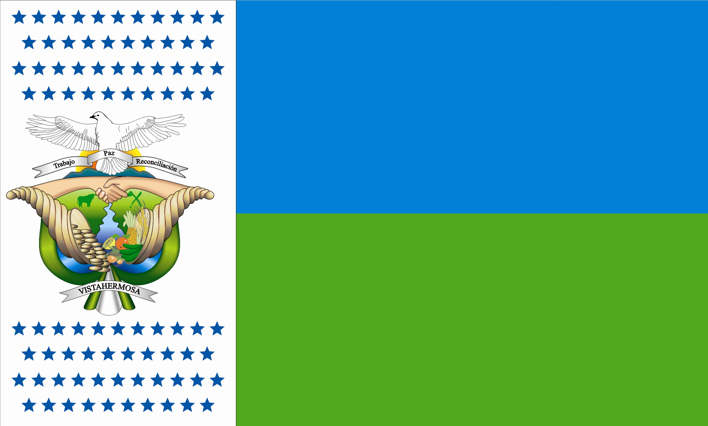 Encontramos el color azul celeste, que representa el patrimonio humano como fuente de vida de todas las especies animales y vegetales. El color verde, hace énfasis a las extensas llanuras y parte de la vistosa Sierra de la Macarena. El color Blanco, simboliza la paz y la reconciliación que tanto anhela un pueblo que ha sido flagelo de la violencia. Las ochenta y cuatro (84) estrellas de color azul oscuro, representan cada una de las veredas que conforman nuestro municipio.[1]